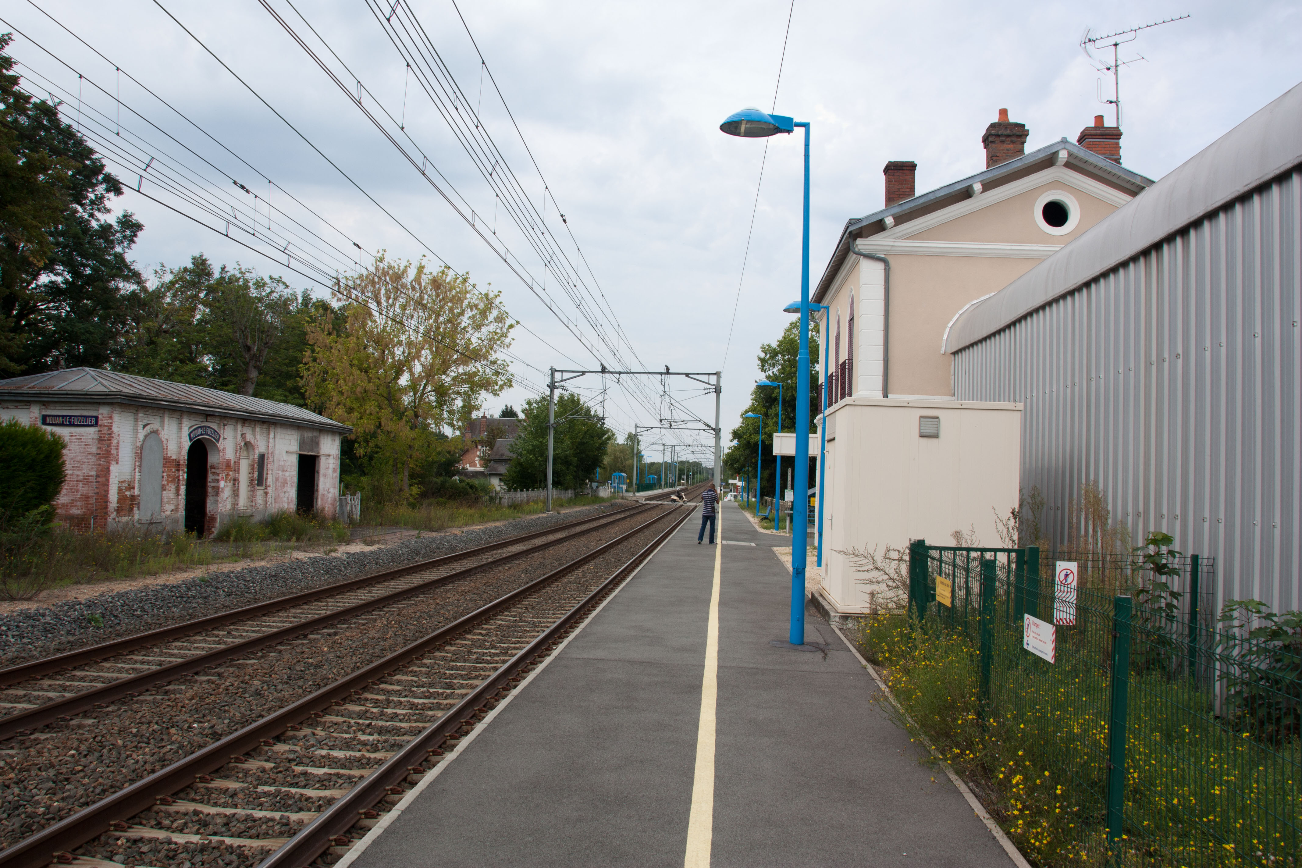 Gare de Nouan-le-Fuzelier, Nouan-le-Fuzelier, Loir-et-Cher, France.